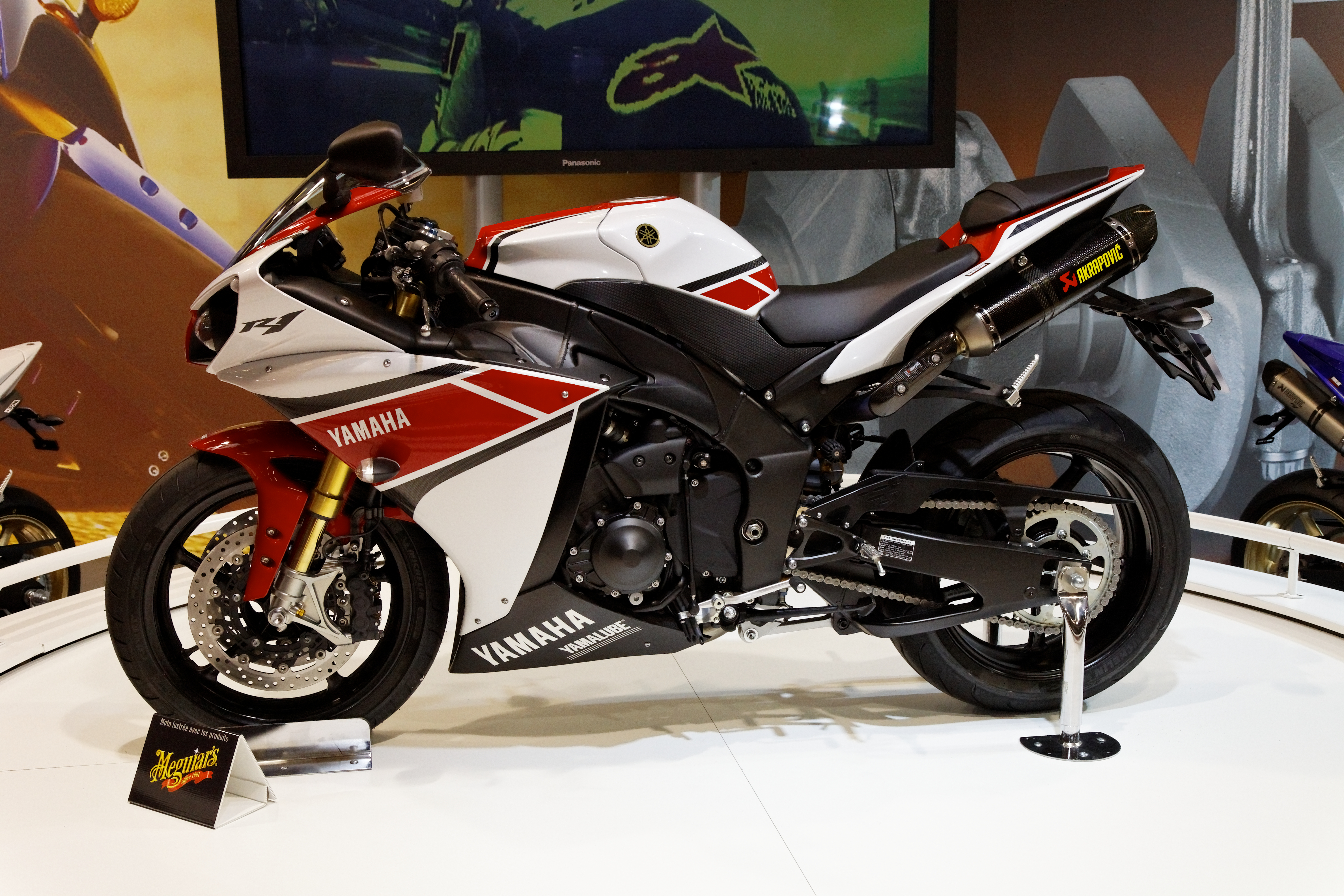 Une moto Yamaha au salon de la moto, Paris, porte de Versailles.